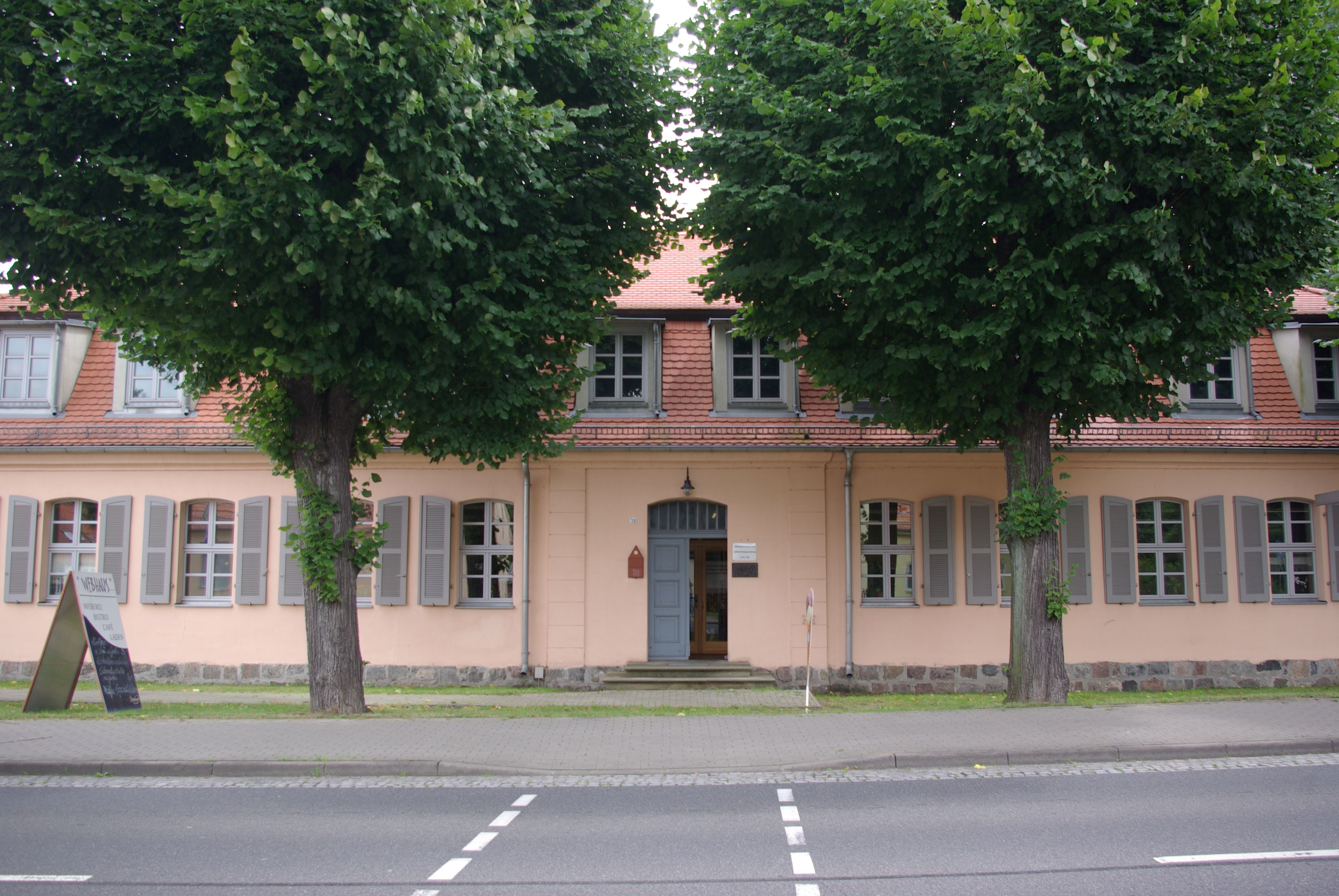 Jüterbog, Ortsteil Kloster Zinna. Das haus in der Berliner Straße 72 steht unter Denkmalschutz. Es ist ein Fabrikantenhaus. Heute beinhaltet das Haus ein Webermuseum.